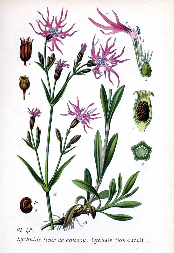 Lychnis flos-cuculi L.